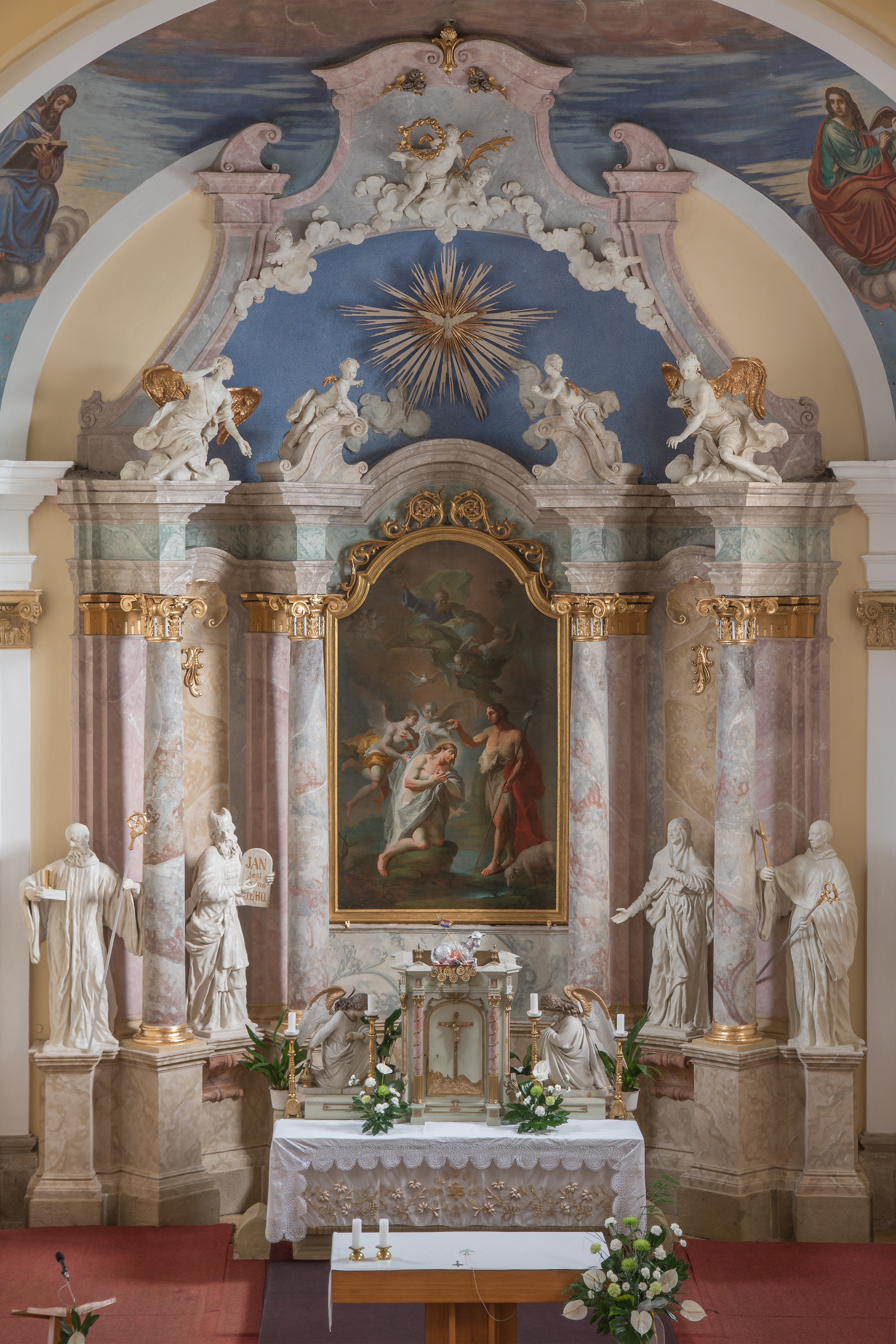 Hlavní oltář kostela sv. Jana Křtitele v Jalubí. Retabulum vytvořila dílna Ondřeje Schweigla kolem roku 1763.